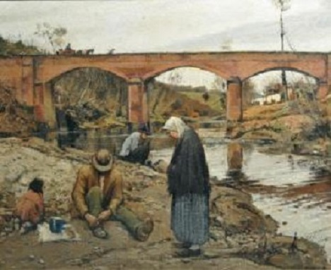 "Sul greto del Pesa a Montelupo", olio su tela, 44.5 x 54.5 cm.